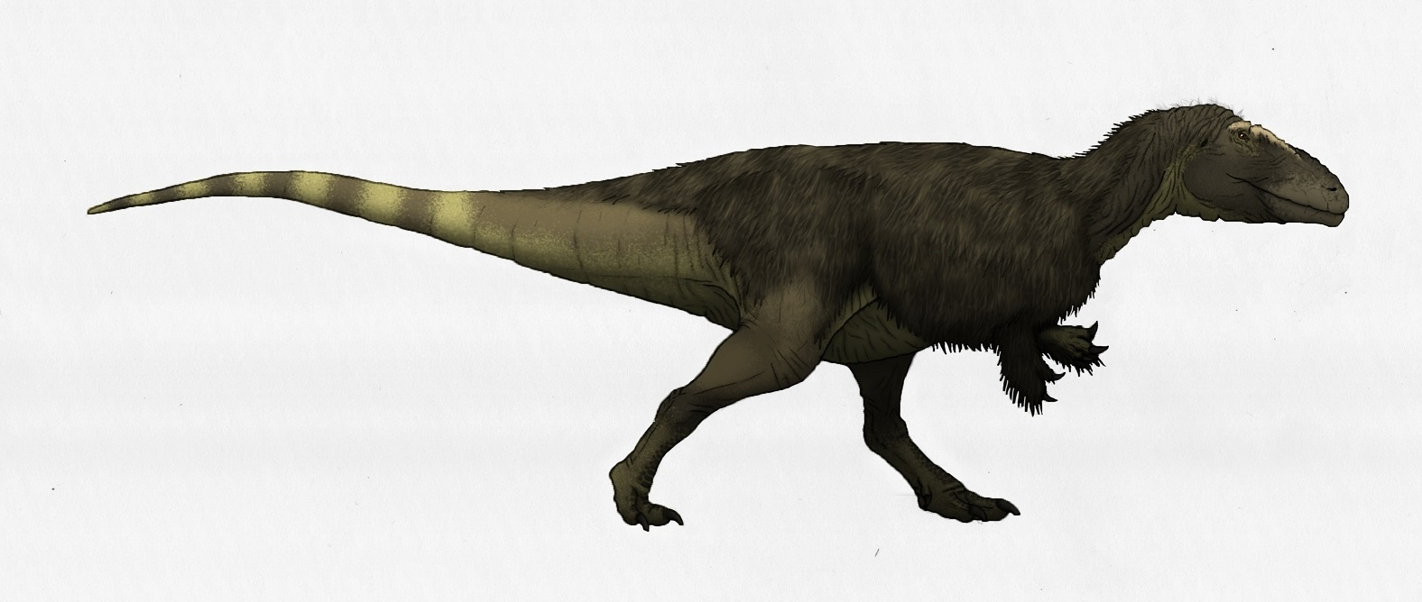 Lajasvenator ascheriae. Credits to Rodolfo A. Coria, Philip J. Currie, Francisco Ortega and Mattia A. Baiano